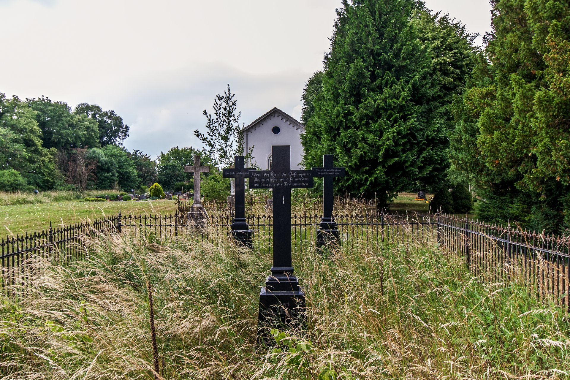 Grabanlagen der Familien von Schlippenbach